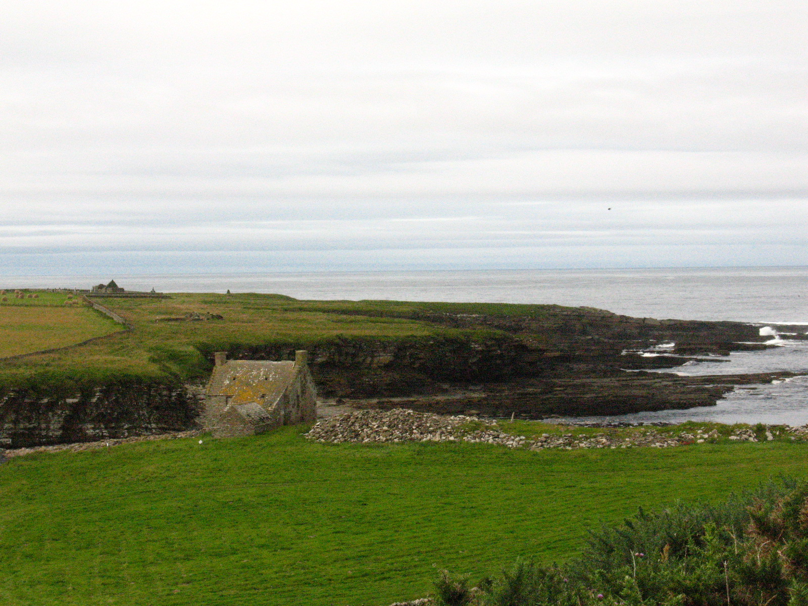 Le site du broch de Crosskirk et de la chapelle Sainte-Marie et ses environs.